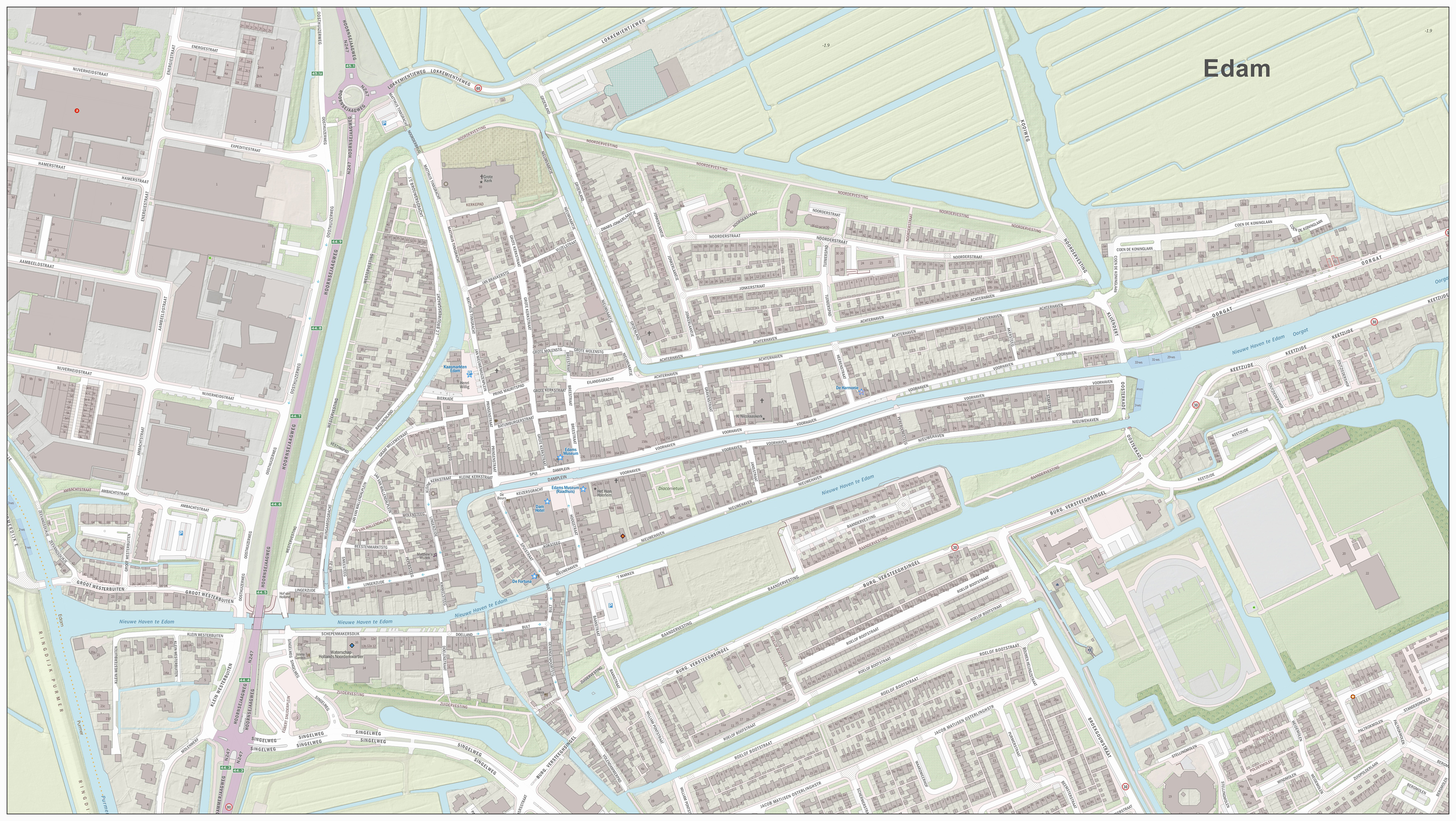 Topografische kaart van Edam (centrum van woonplaats). Resolutie: 2688 pixels/km. Kaartbeeld samengesteld uit de open geodata van de Basisregistratie Grootschalige Topografie (BGT), Creative Commons-BY Kadaster, en Top10NL en Top25namen (Basisregistratie Topografie, Kadaster), Creative Commons-BY Kadaster. Gebouwvlakken uit open geodata BAG extract, Creative Commons-BY Kadaster. Wegen uit de OpenStreetMap, CC-BY OpenStreetMap bijdragers. Reliëfschaduw uit de Actuele Hoogtekaart AHN2/AHN3. Samenstelling en kleurenschema: Jan-Willem van Aalst, met QGIS2. Zie ook de Legenda.